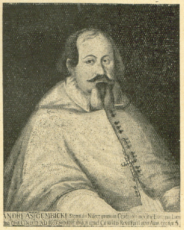 Andrzej Gembicki, bishop of Lutsk